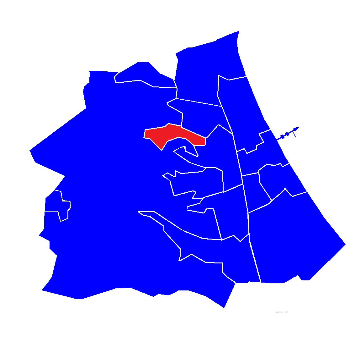 Przylesie - dzielnica Sopotu